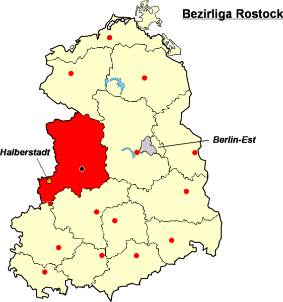 Localisation d'Halberstadt dans la Bezirksliga Magdebourg Catégorie:Logo de clubs de football - Allemagne